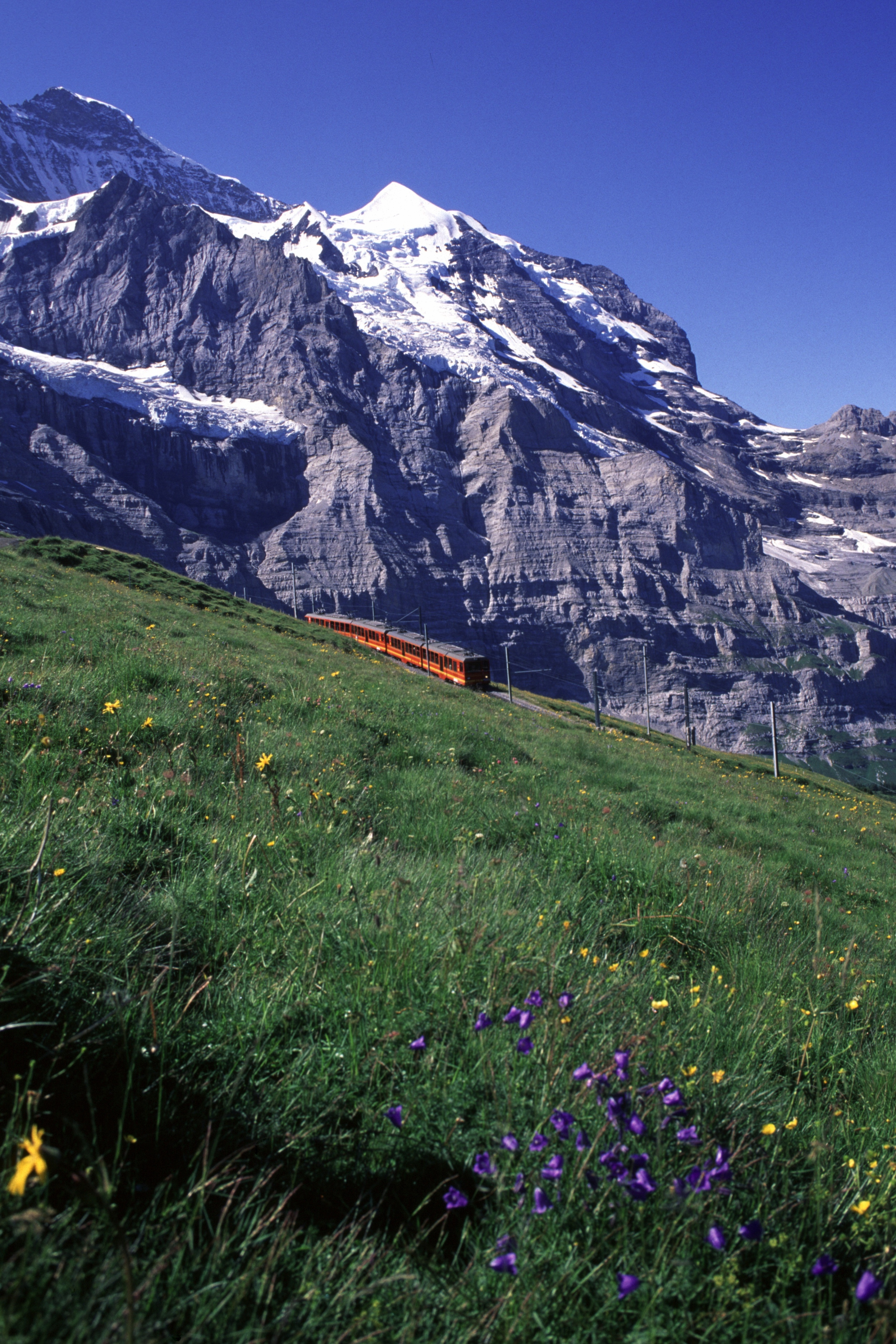 Swiss Rail Junfraubahn JB BDhe 4/8 from Eigergletscher to Kleine Scheidegg Station